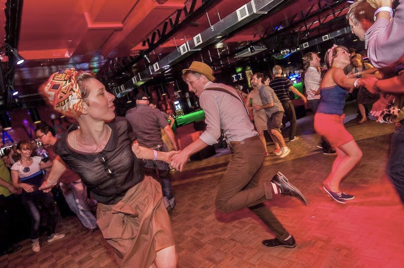 Lindy Hop Exchange, Klub Huta Warszawa 22/6 2013 r.